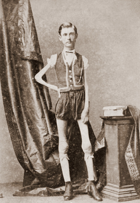 Isaac W. Sprague (1841-1887)